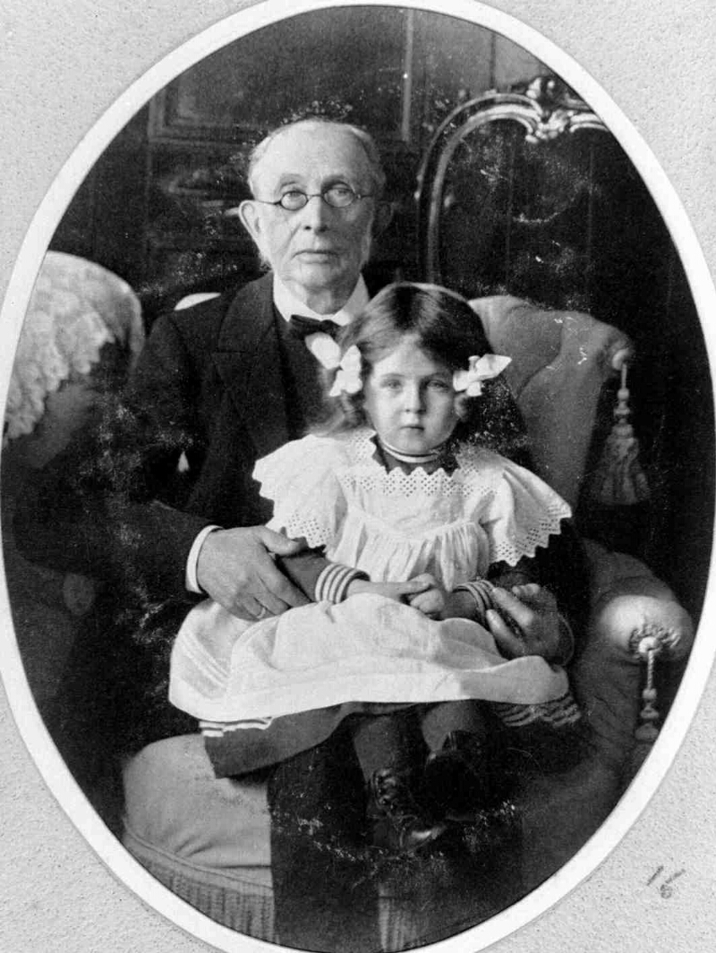 К. П. Победоносцев с приемной дочерью Марфой